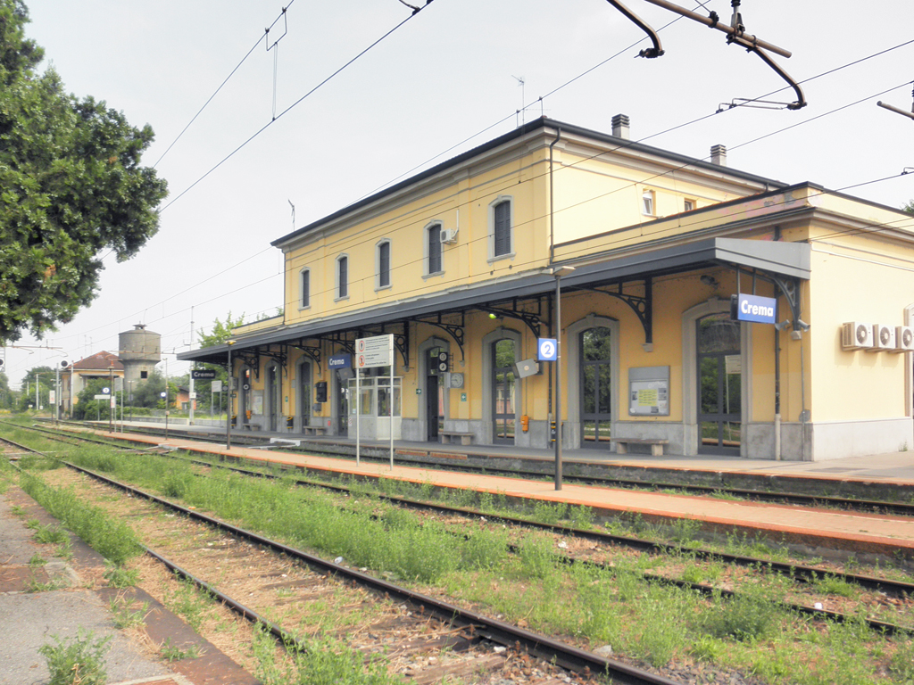 Interno della stazione ferroviaria di Crema